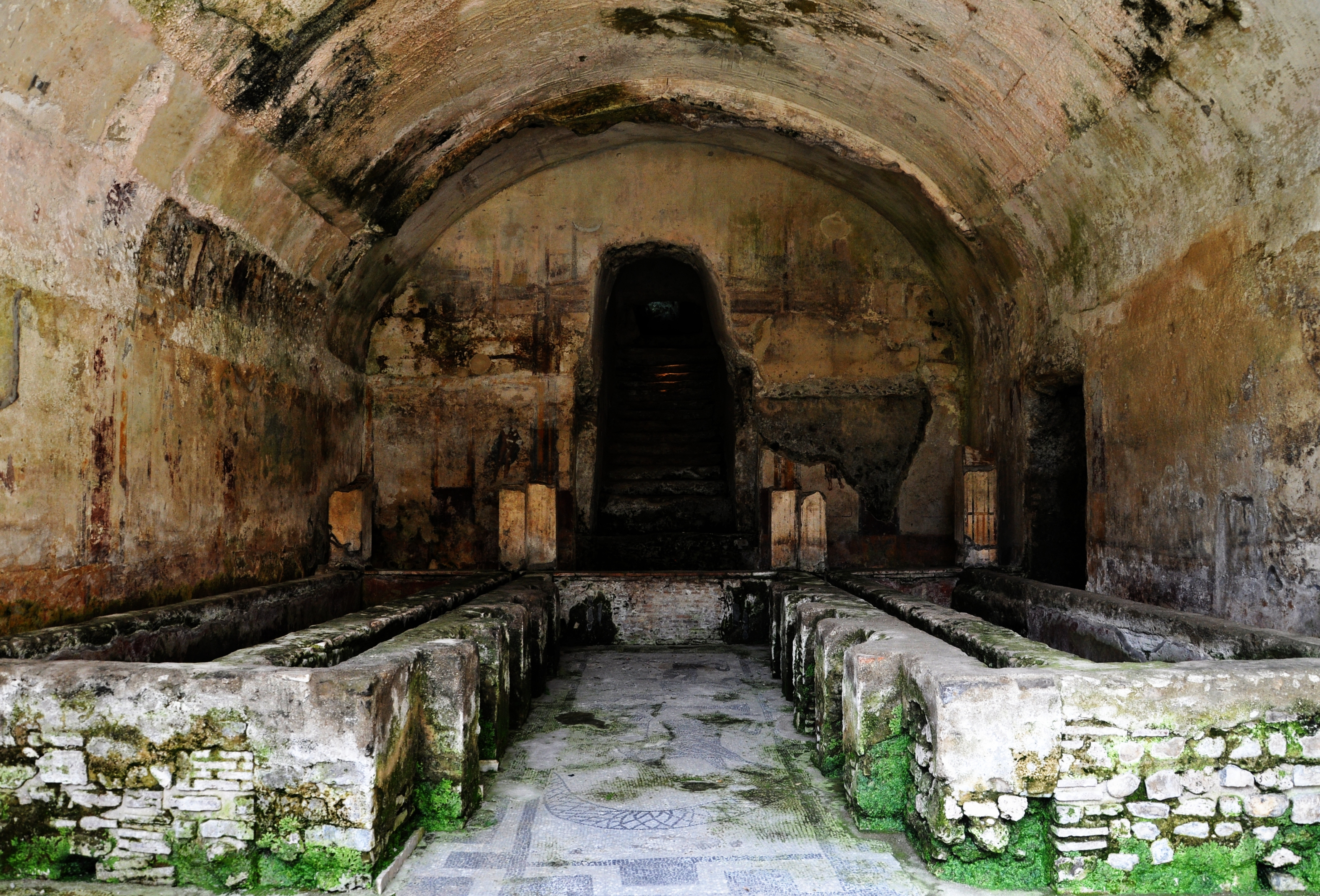 Villa romana di Minori - MIBAC This is a photo of a monument which is part of cultural heritage of Italy.